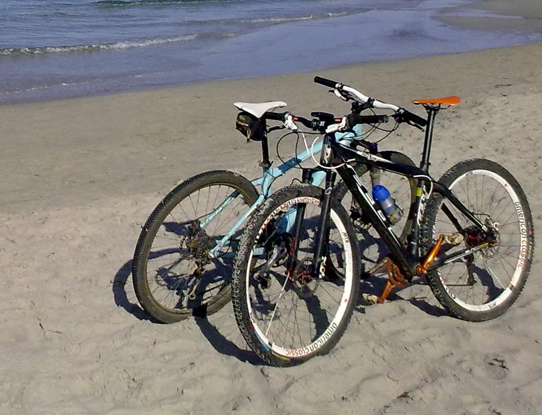 due mtb "29er"